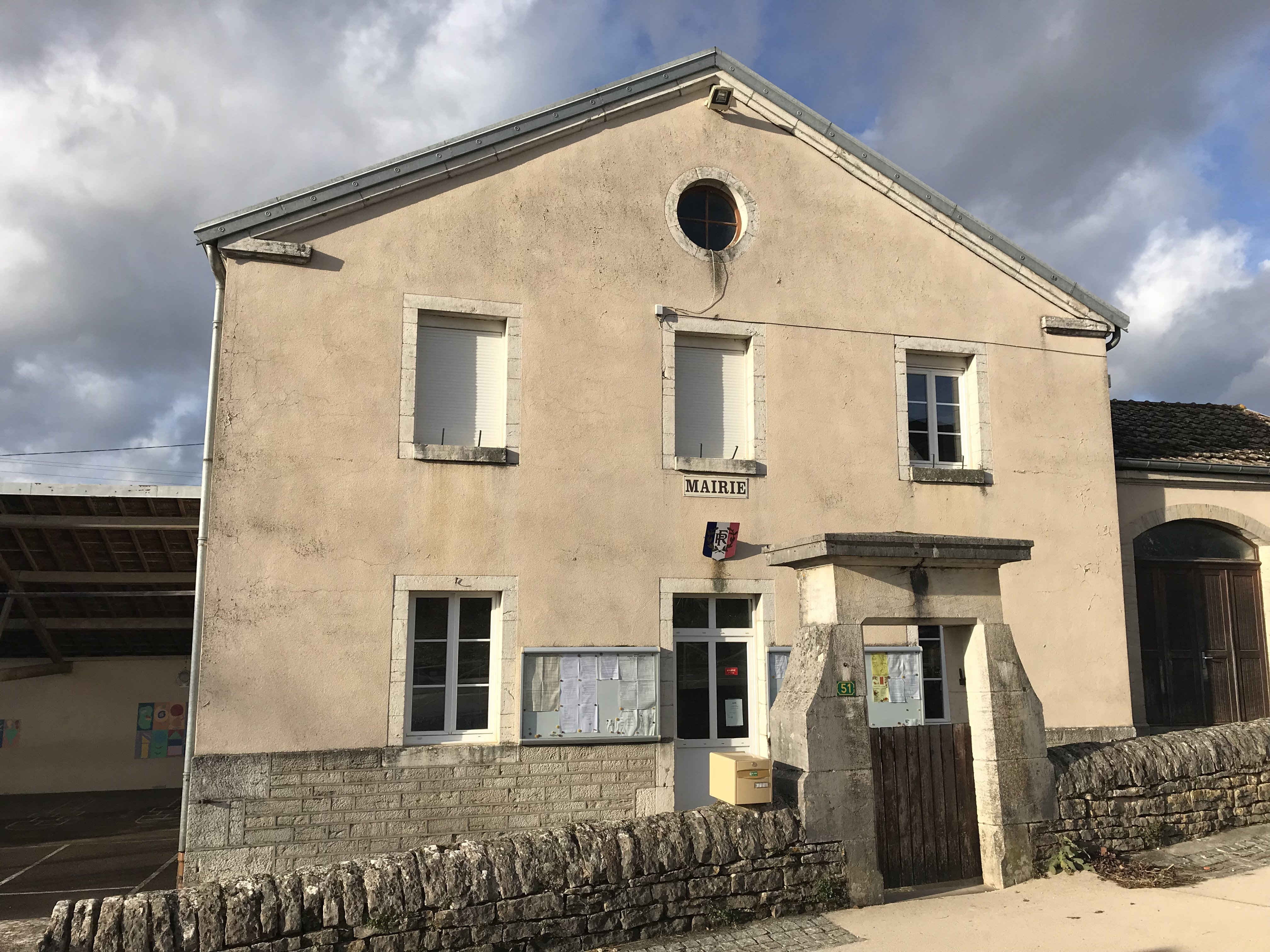 Image d'Évans (Jura, France) en janvier 2018.